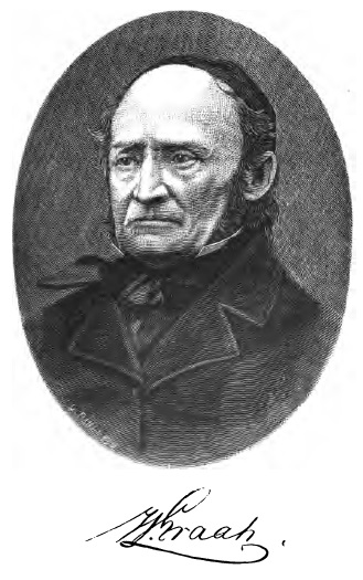 Wilhelm August Graah (1793-1863), dänischer Marineoffizier und Grönlandforscher